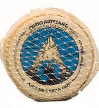 Queso de La Peña